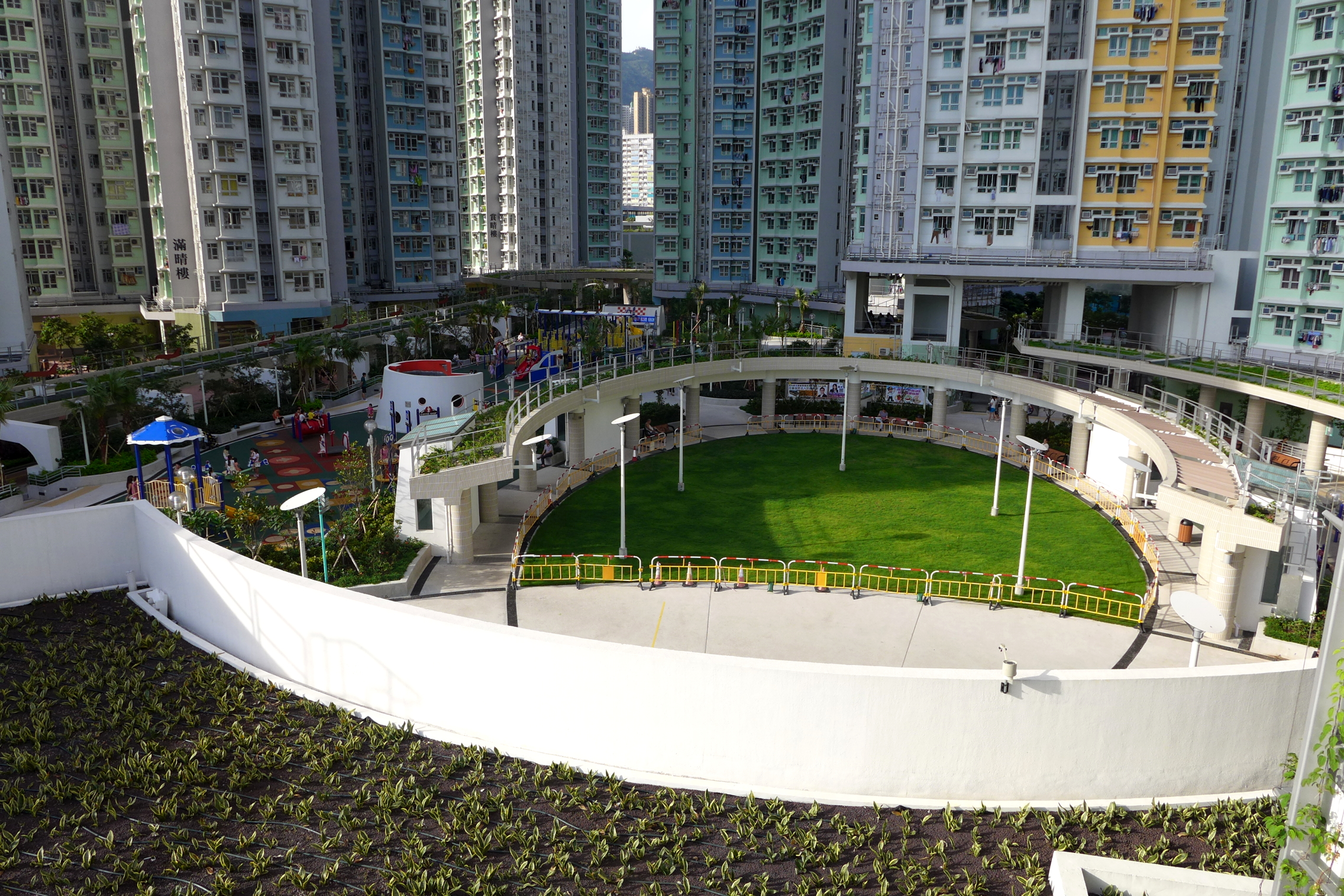 Kai Ching Estate Garden Overview